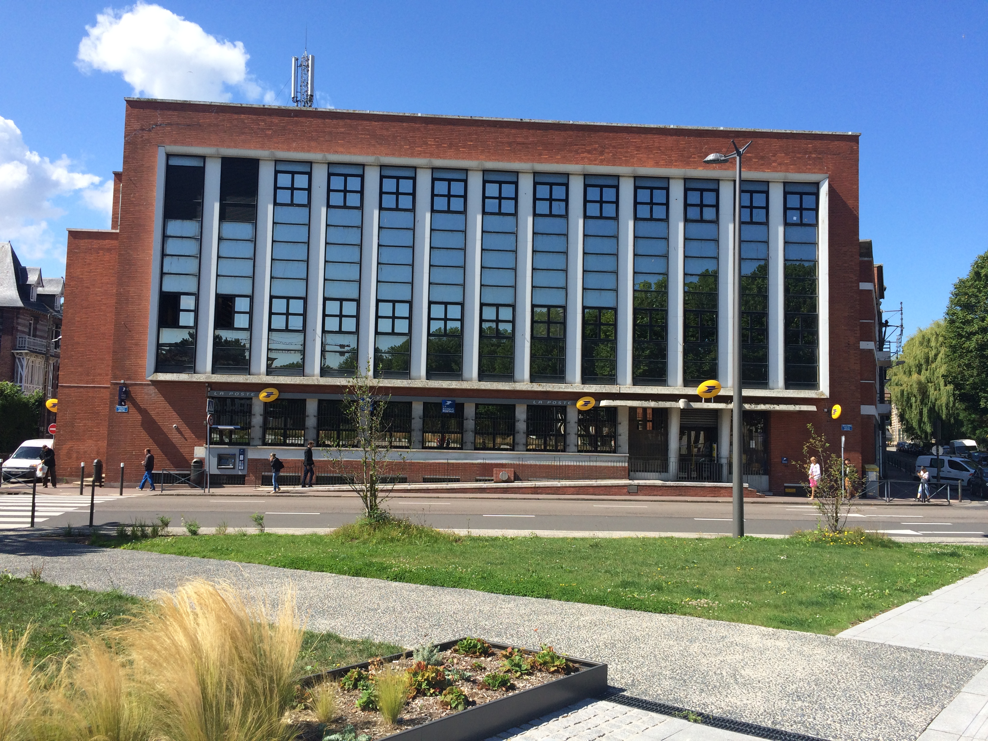 Batiment des Postes, Dieppe